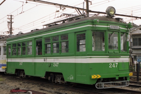 阪堺電軌モ205型247